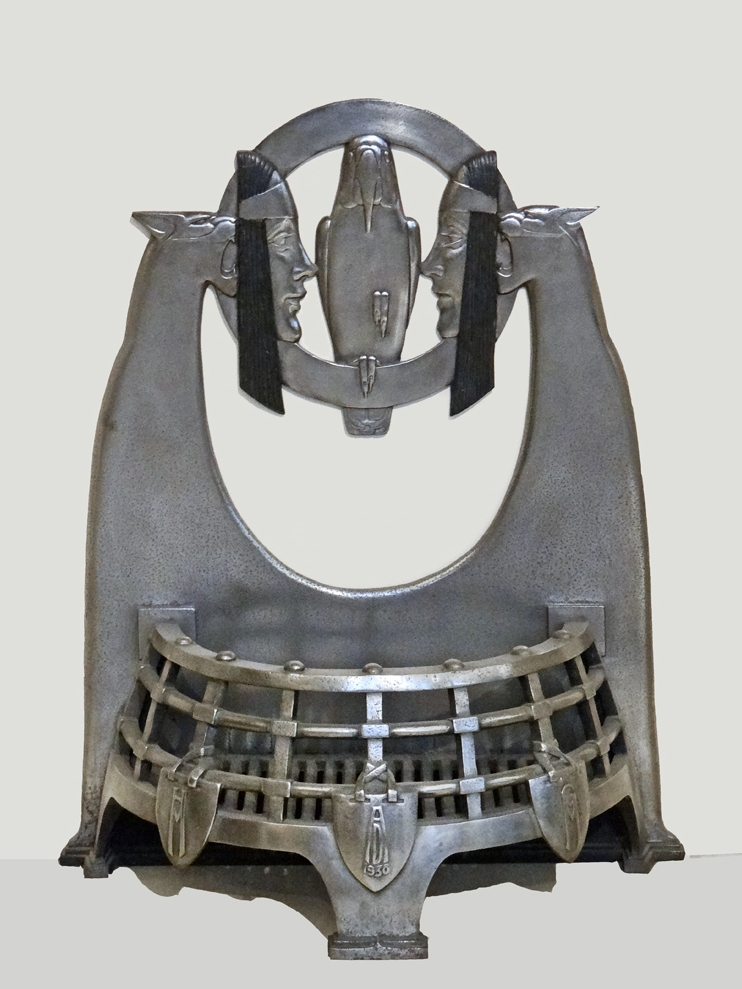 Brasero de style art déco accompagnant le relief "Scandale" (voir photo précédente) Oeuvre de Charles Sargeant Jagger (1885-1934) 1930 Fonte Mulberry House, Smith Square, Westminster